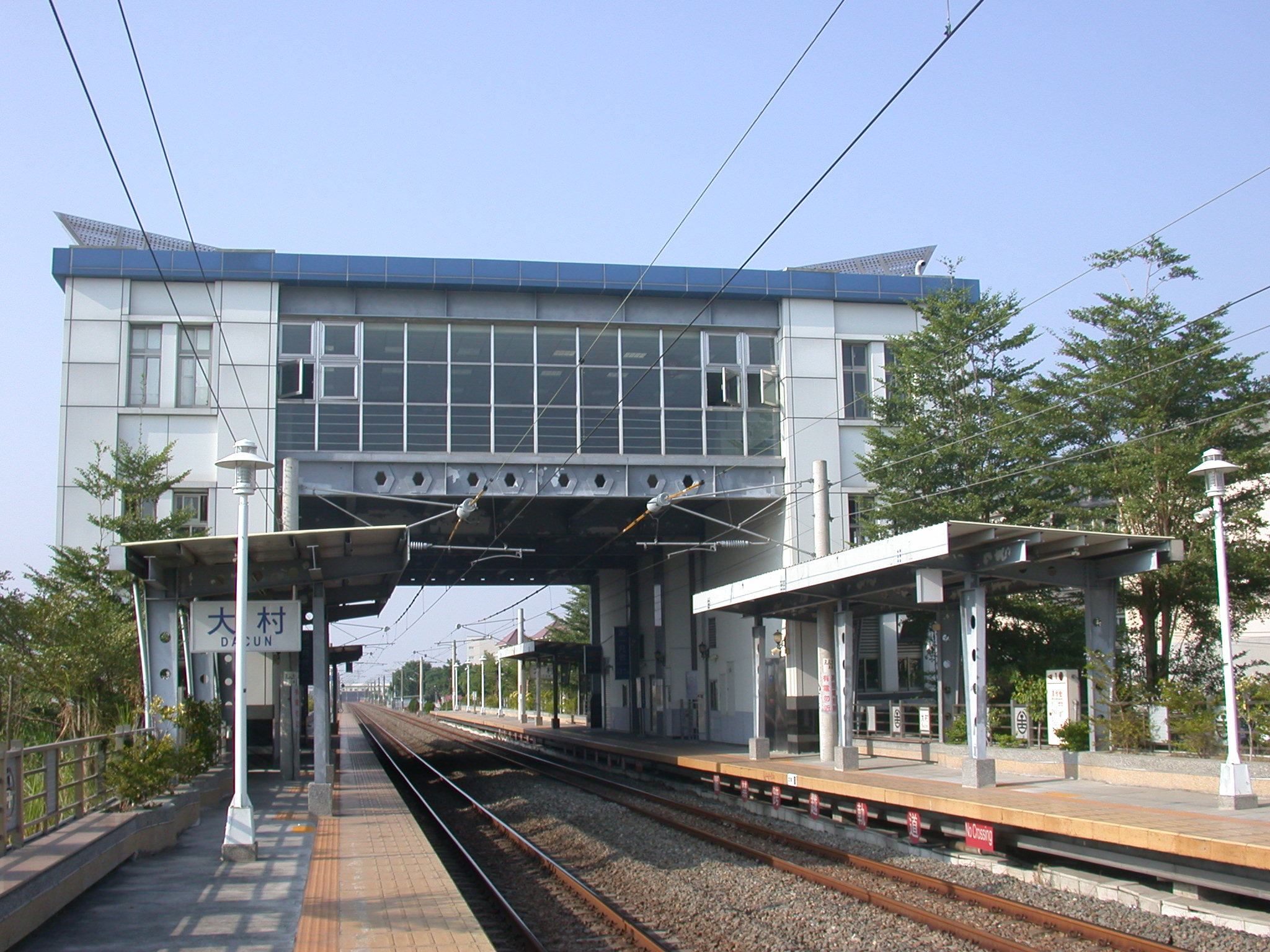 Bân-lâm-gú: 大村車站佮月臺。